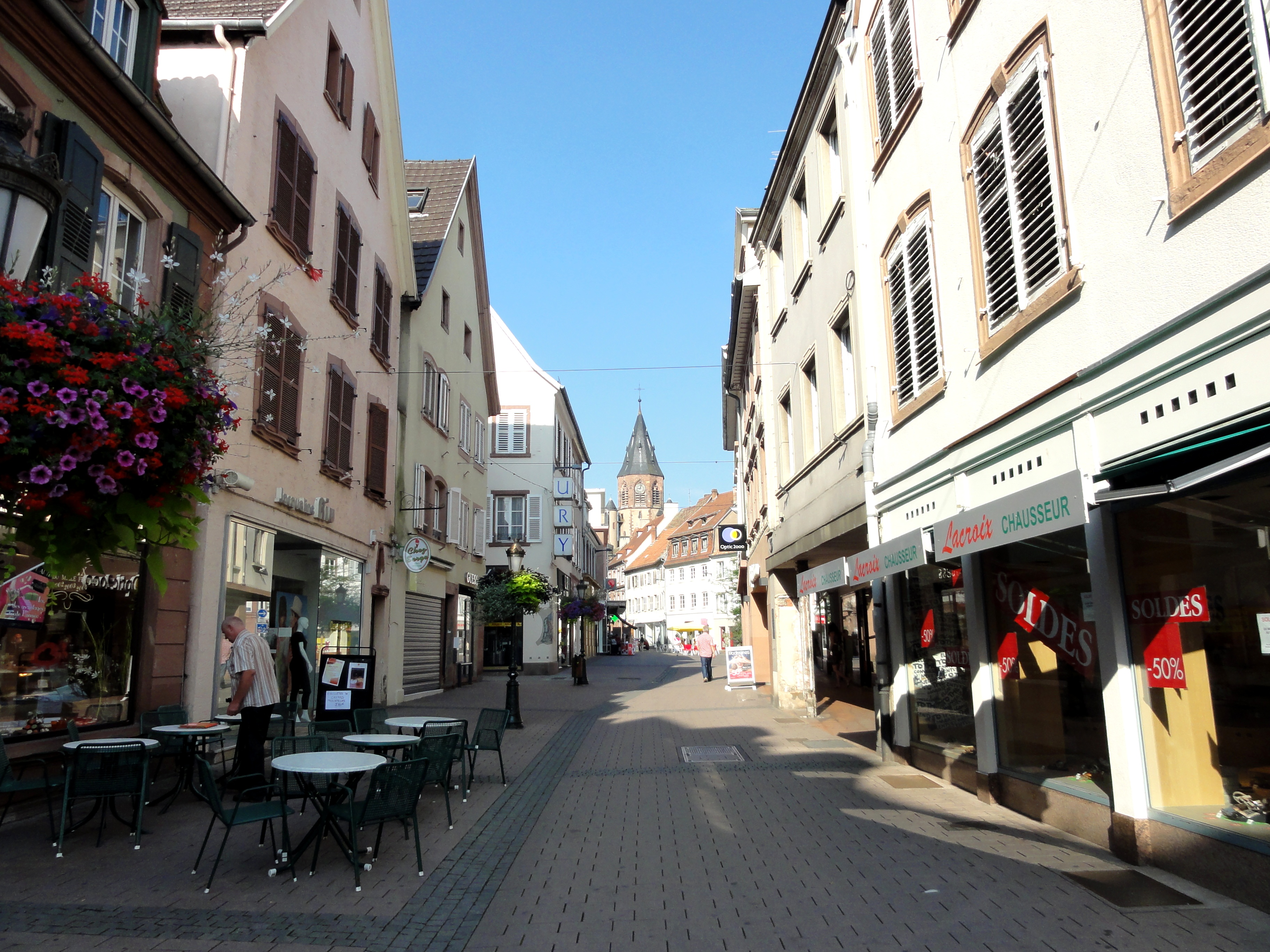 Alsace, Bas-Rhin, Haguenau, Grand’Rue.